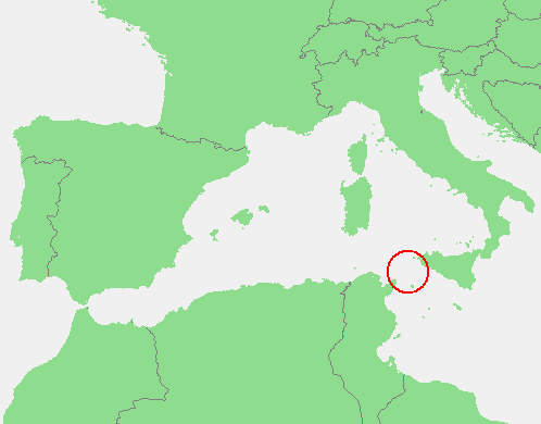 In dutch: Locatie Kanaal van Sicilie.PNG